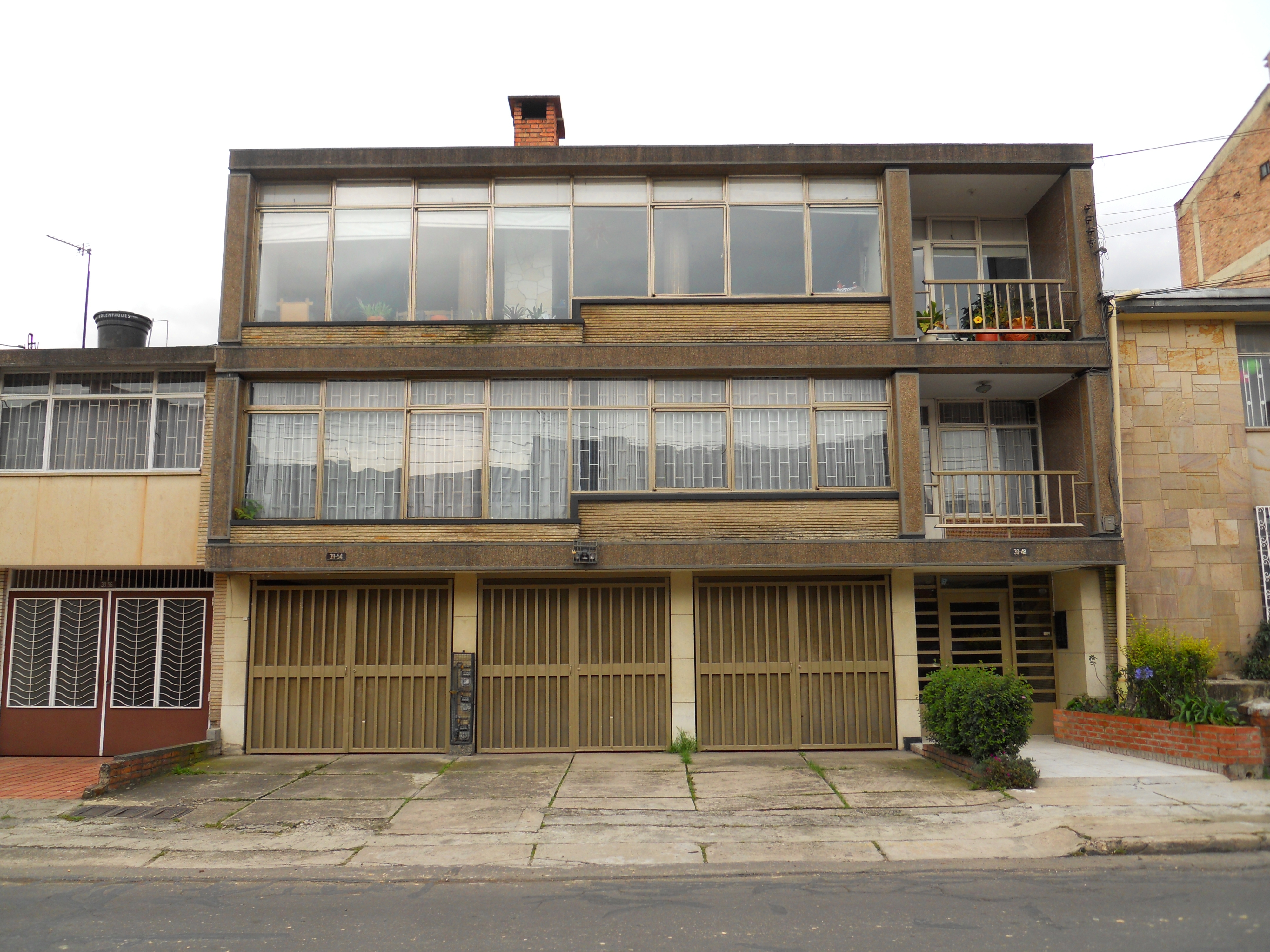 Edificio en la carrera 25 con calle 39 en Bogotá, barrio La soledad de la localidad de Teusaquillo.